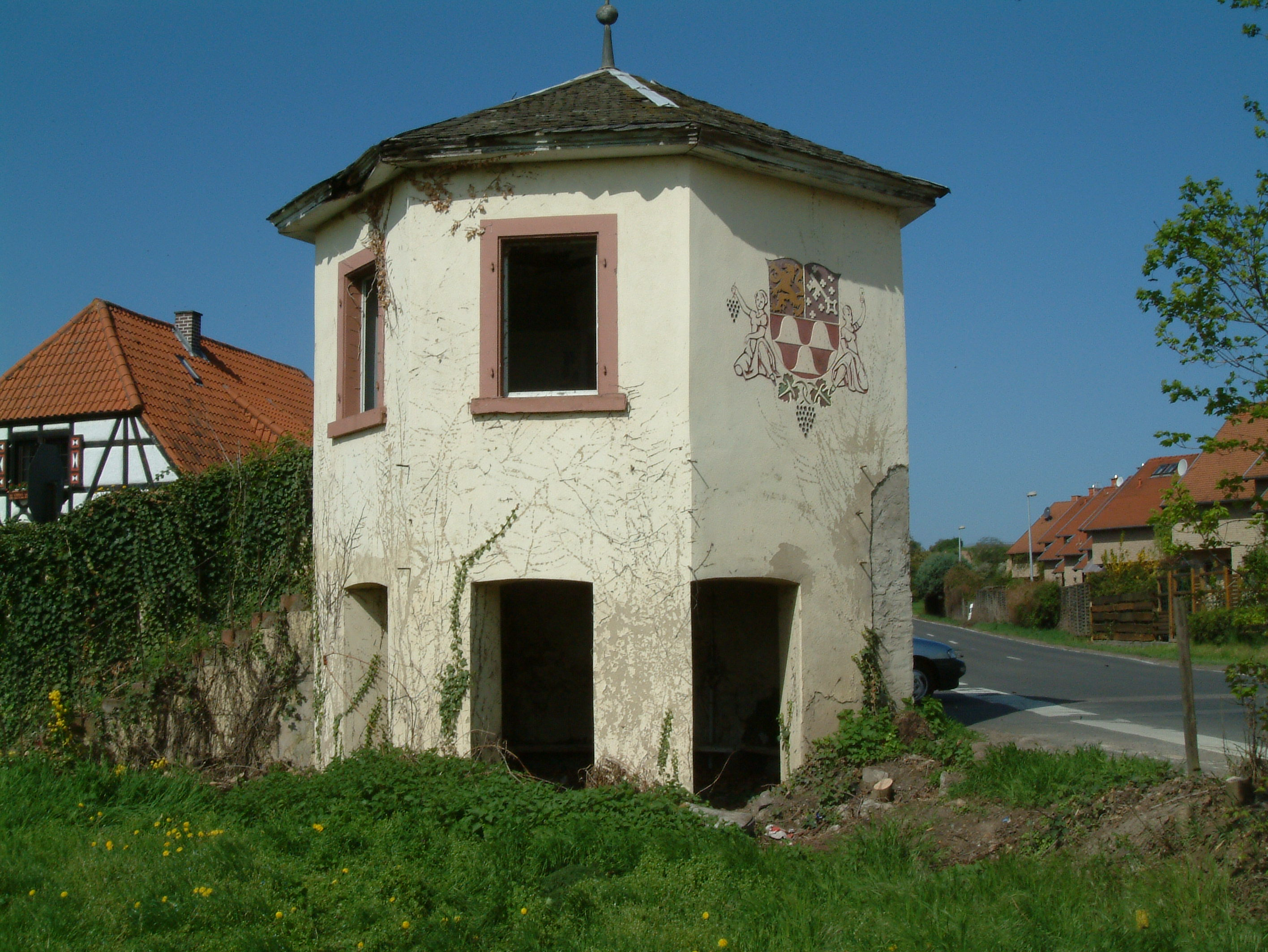 Gartenpavillon mit Perron-Malerei zu Dirmstein, selbst fotografiert am 28.04.2006 und freigegeben durch Benutzer:Mundartpoet